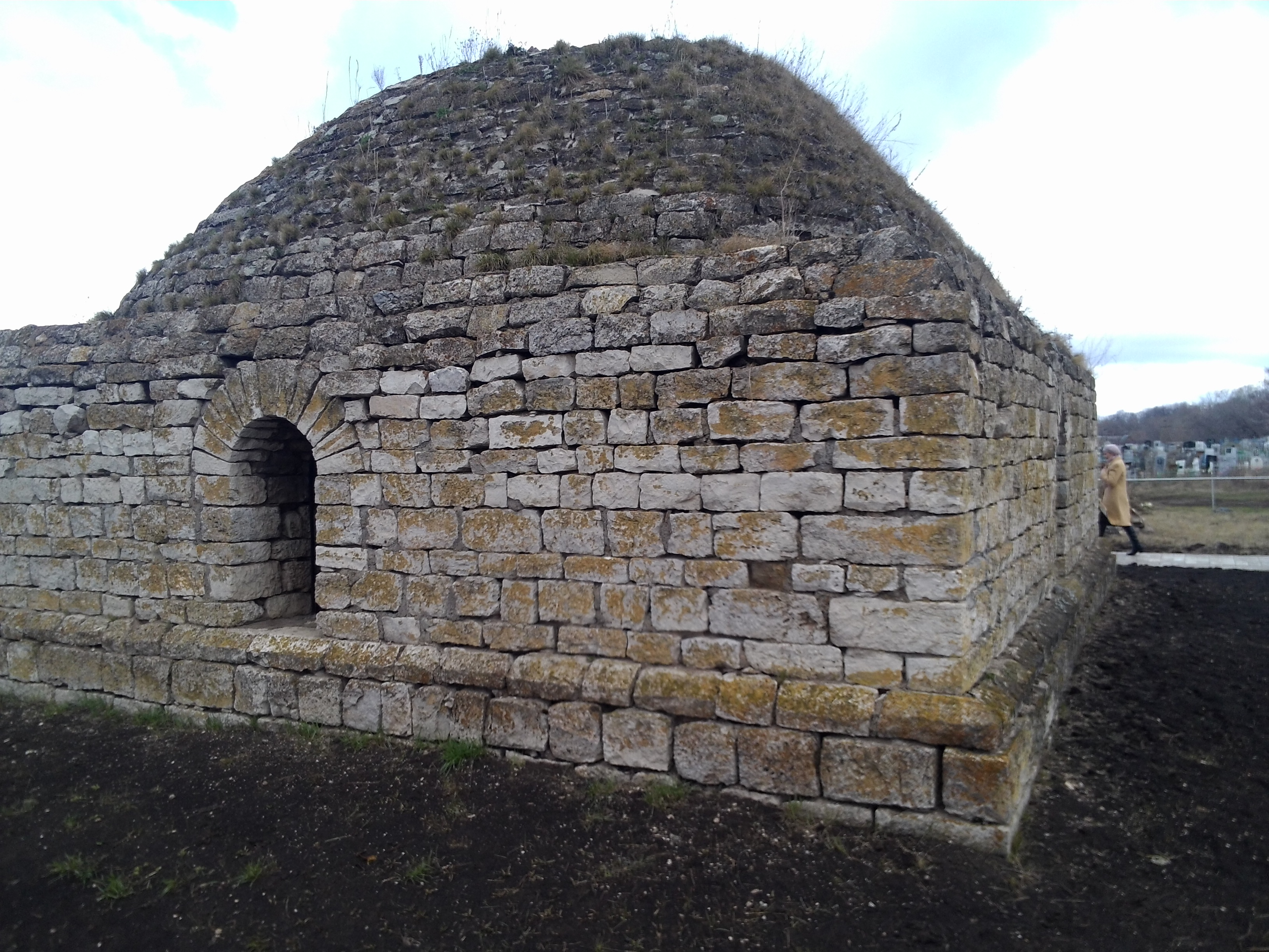 Мавзолей Хусейн-бека (Республика Башкортостан, посёлок Чишмы, восточная окраина поселка, левый берег р. Дема)